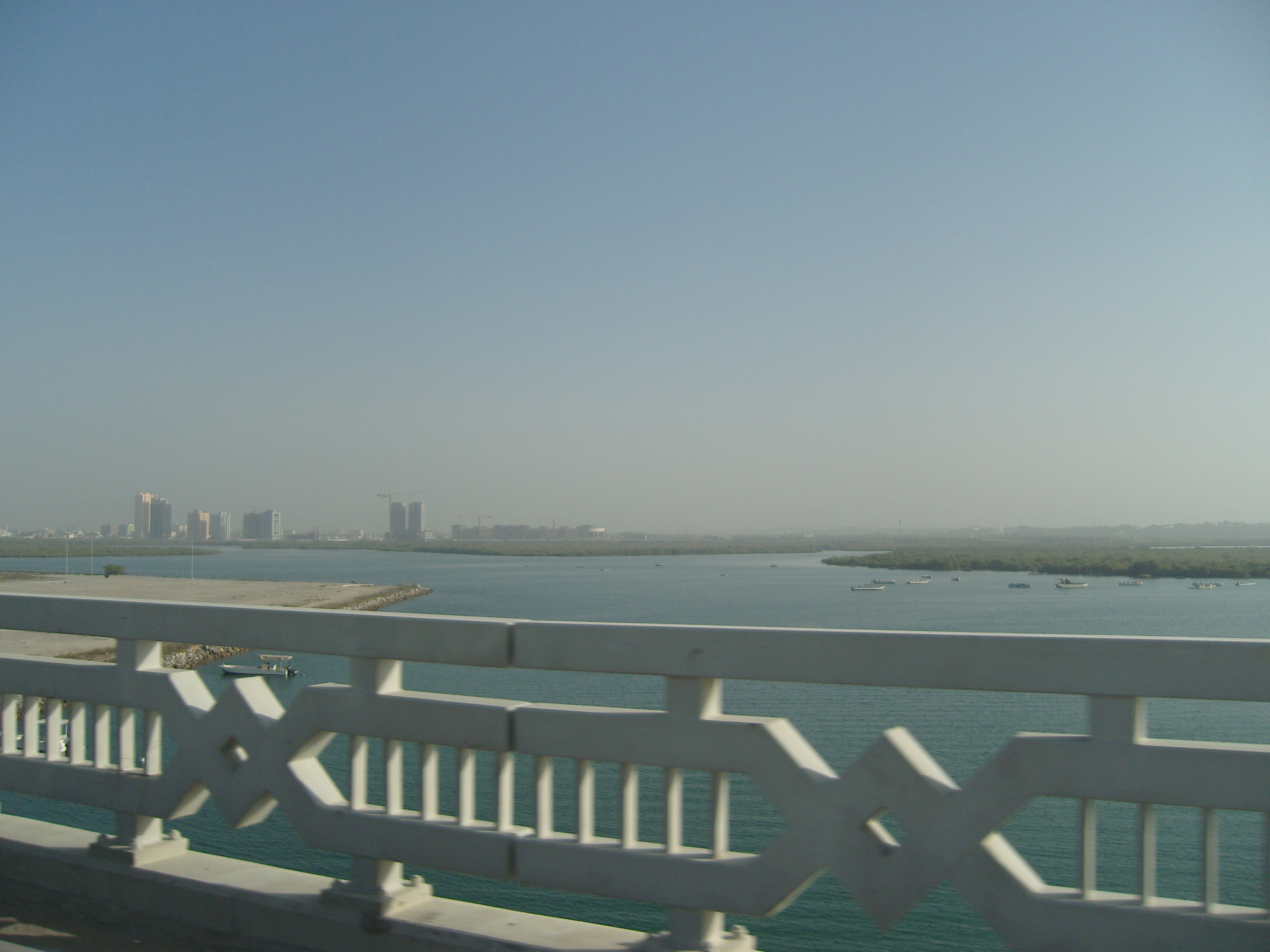 Chaur Ra’s al-Chaima - Lagune in Ra’s al-Chaima